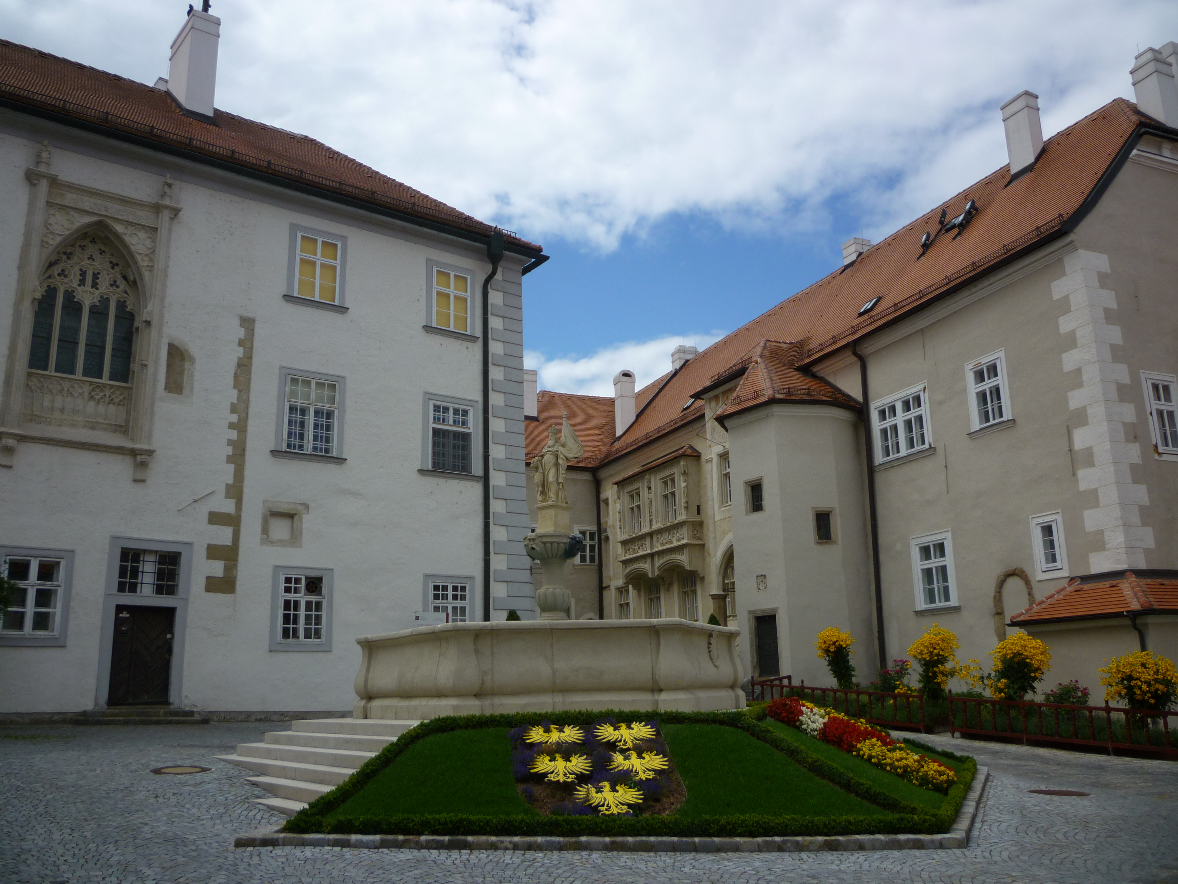 Leopoldihof im Stift Klosterneuburg